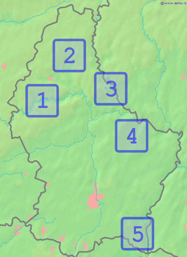 Grondlagekaart stamt aus der Commons.